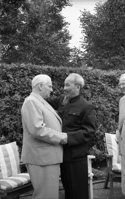 Berlin, Besuch Ho Chi Minh bei Wilhelm Pieck ADN-ZB Heilig, 25.7.1957, Ho chi Minh besuchte Präsident Wilhelm Pieck. Der Präsident der Demokratischen Republik Vietnam, Ho chi Minh, stattete am 25.7.1957 nachmittags dem Präsidenten der DDR, Wilhelm Pieck, einen Besuch ab. Bei dem Besuch waren zugegen: Ministerpräsident Otto Grotewohl, der Erste Stellvertreter des Vorsitzenden des Ministerrates und 1. Sekretär des ZK der SED, Walter Ulbricht, der Chef der Präsidialkanzlei, Staatssekretär Max Opitz, sowie der Chef des Protokolls, Dr. Max Humboltenberg. U.B.z.: Herzliche Begrüssung zwischen Präsident Ho chi Minh und Präsident Wilhelm Pieck. Abgebildete Personen: Ho Chi Minh: Präsident, DR Vietnam (GND 11855168X) Pieck, Wilhelm: Präsident, Politbüro der SED, Vorsitzender der KPD, DDR